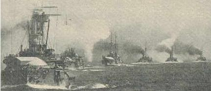 Die deutsche ostasiatische Linienschiffsdivision in den chinesischen Gewässern.